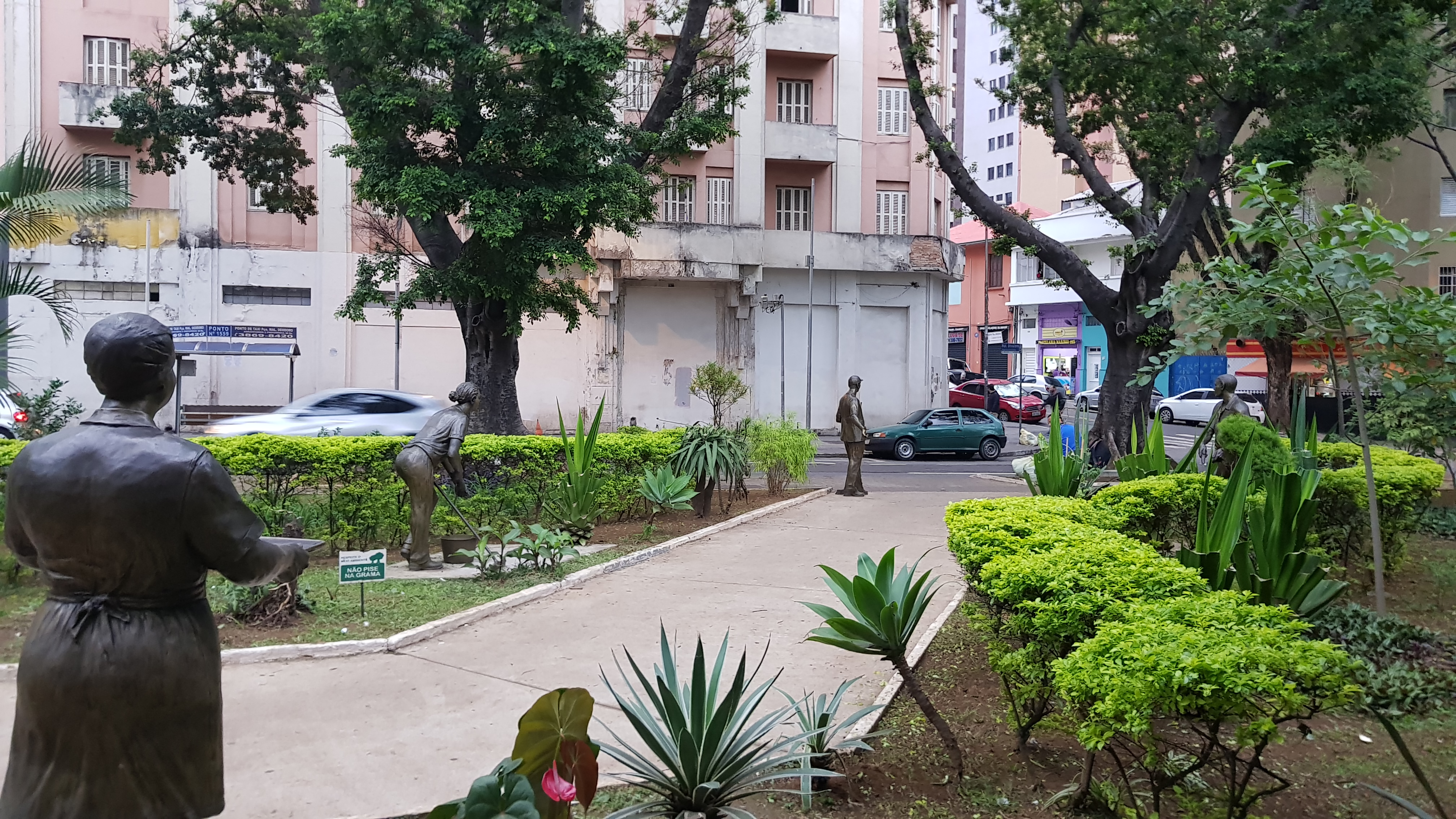 Vista da praça pelo lado que está situado abaixo do Elevado Presidente João Goulart.